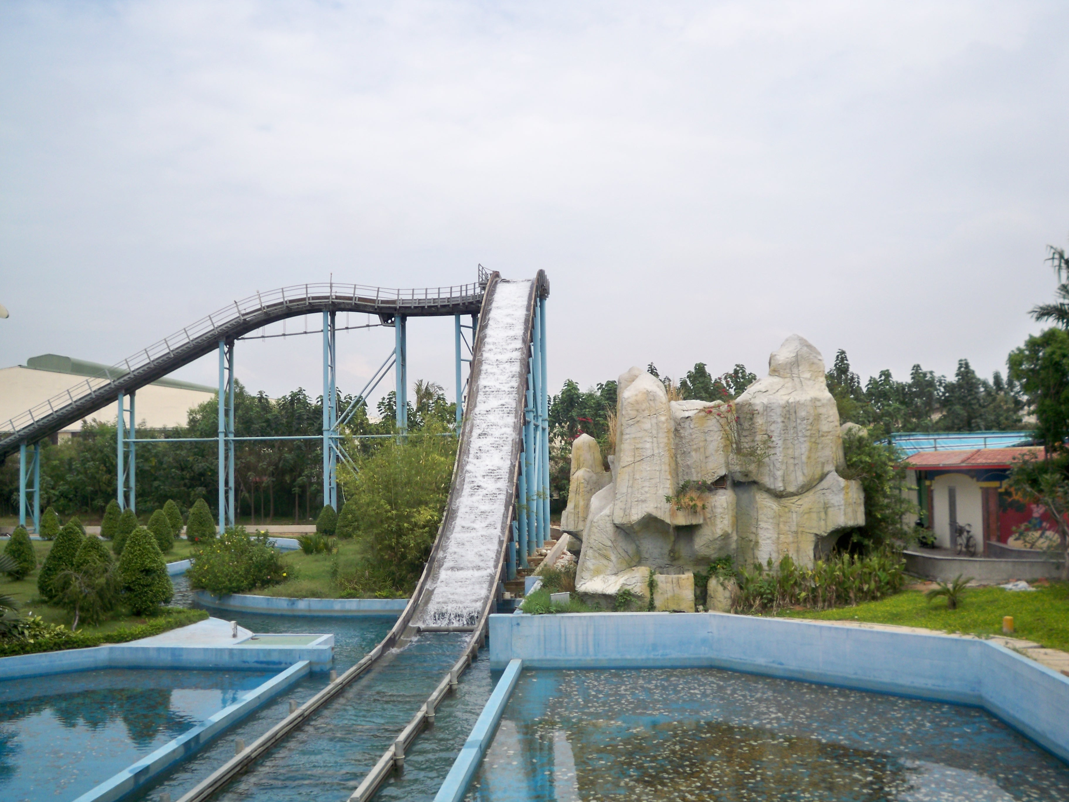 Vượt thác Đại Nam